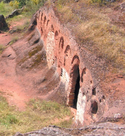 Situado en el cerro de la Alcobilla, entre Zagahón y Los Escuderos, se encuentra el oratorio rupestre visigótico de Valdecanales. Es el único hipogeo que se conserva en el sur de España y fue declarado Monumento Nacional el 21 de marzo de 1970. Este oratorio está formado por tres cuevas excavadas en roca de arenisca y protegidos por otra de granito. La fachada principal, labrada en un talud, presenta una larga arcada ciega con arcos de herradura clásica. Su interior representa una capilla de tres naves con bóvedas de cañón sobre pilastras cuadradas, que tienen una greca en las líneas de arranque de los arcos transversales. Las otras dos cuevas, de menor dimensión, también con bóvedas de cañón y absidiolas, pudieron estar destinadas a baptisterio y refectorio. Fotografía cedida a Cristóbal Pulpillo López por el director de la revista Faro 2.000 en Septiembre de 2.004.